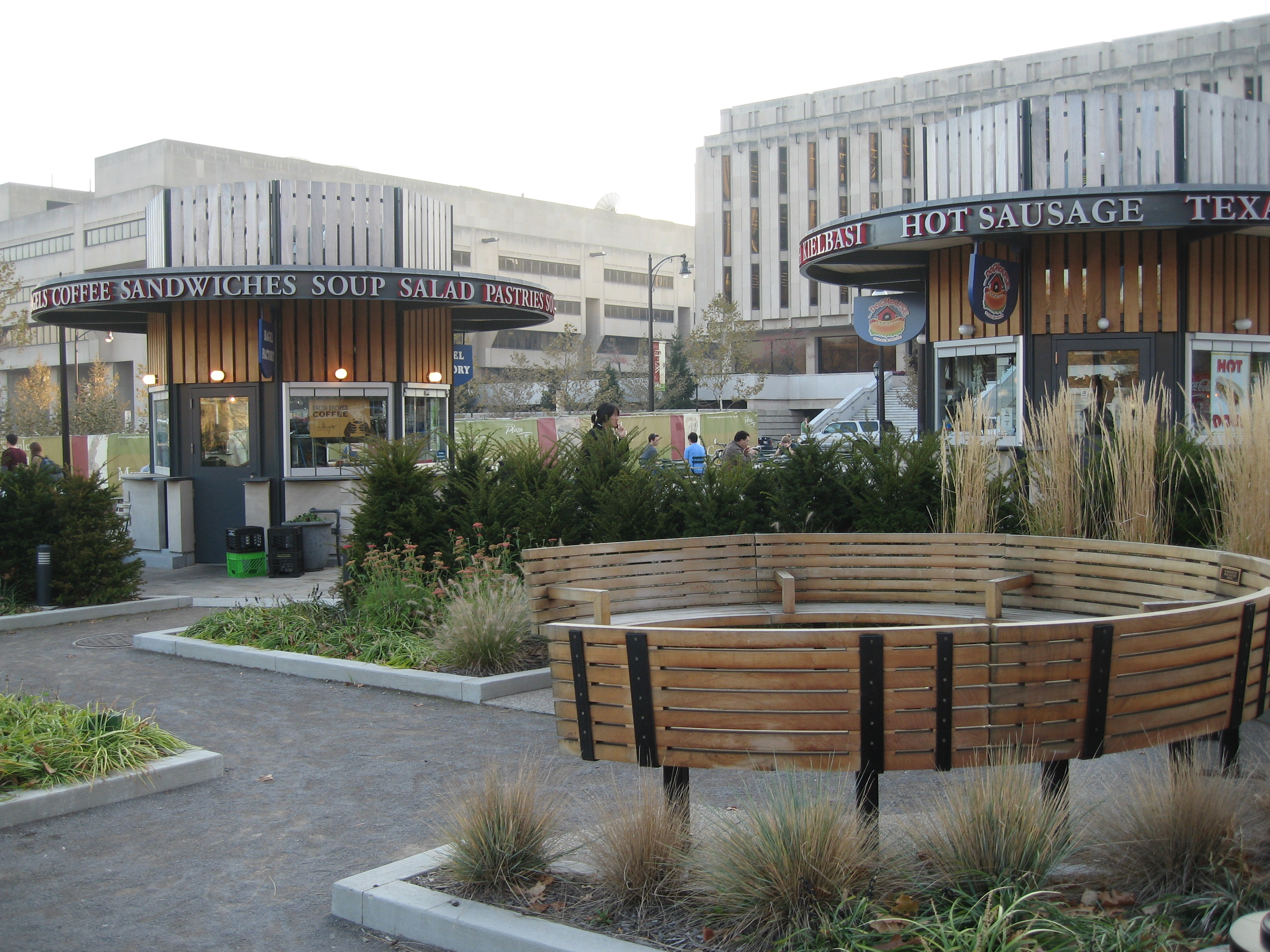 Park Bench between Hillman and Carnegie Libraries